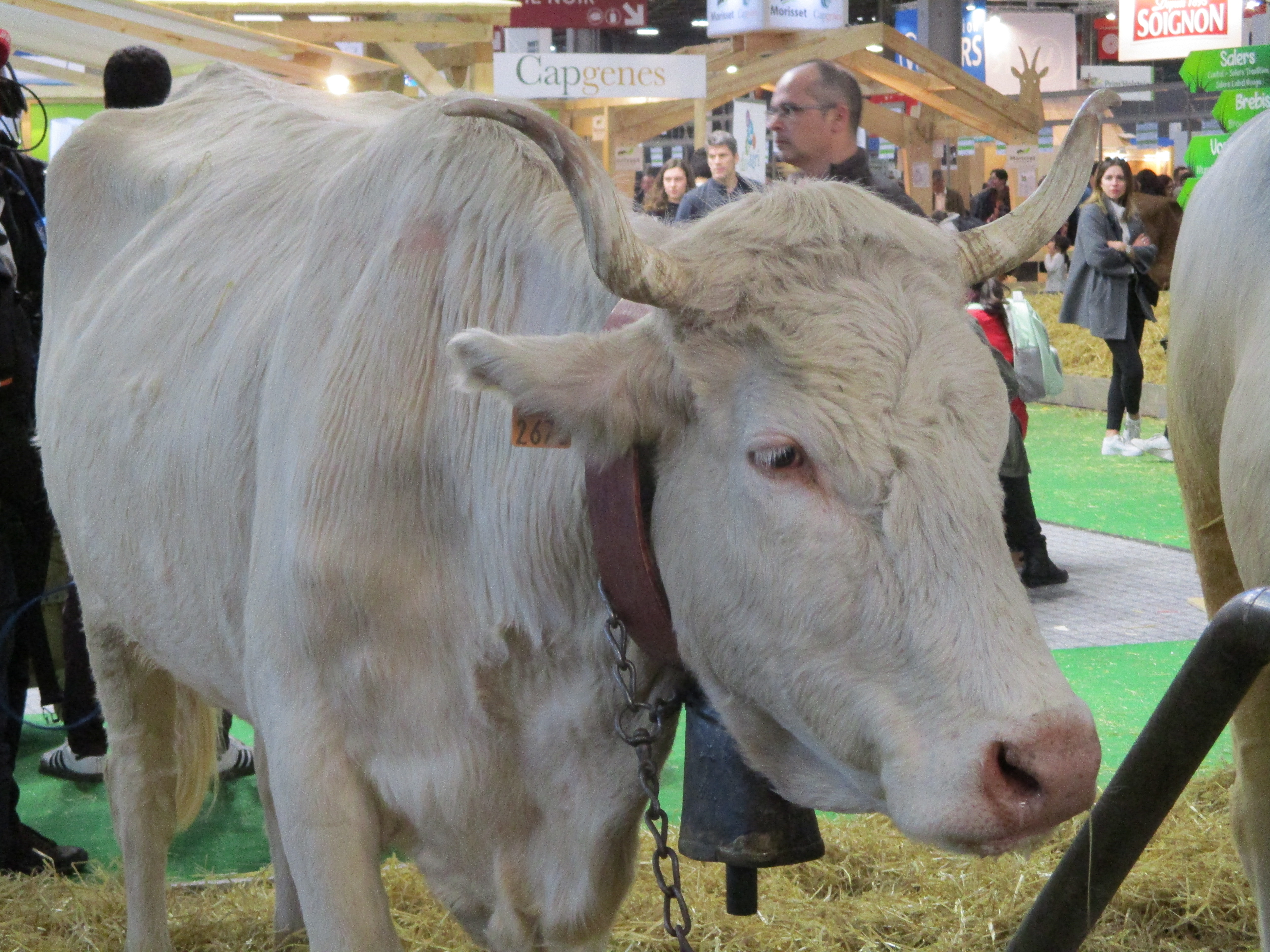 Salon international de l'agriculture 2019 ː vache lourdaise née le 7 juin 2012.